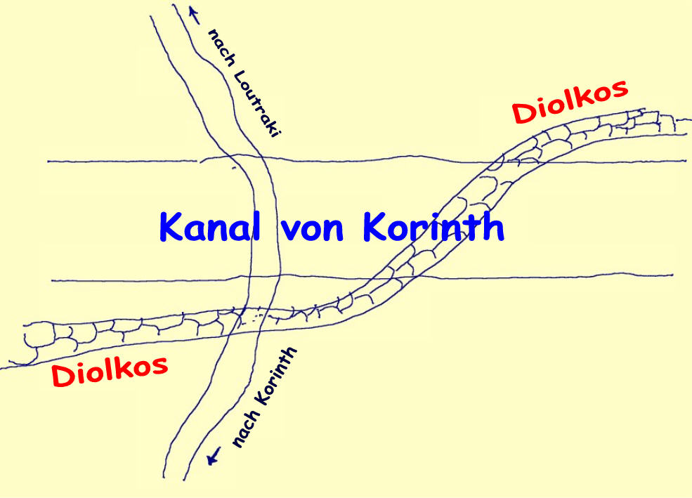 Skizze des Diolkos